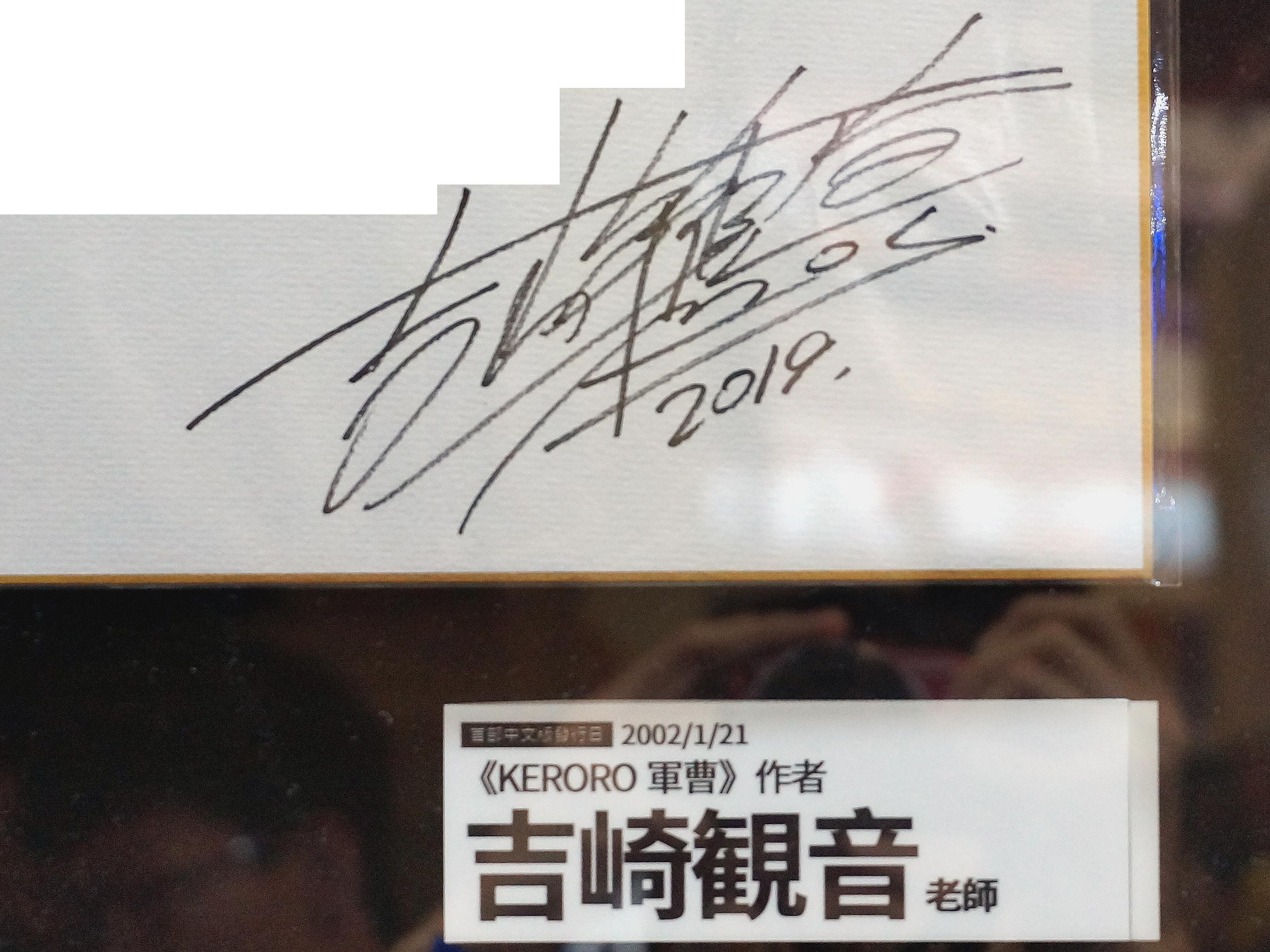 第20屆漫畫博覽會，台灣角川攤位「歷年作者&畫家親筆簽名共演區」展示的吉崎觀音簽名板。